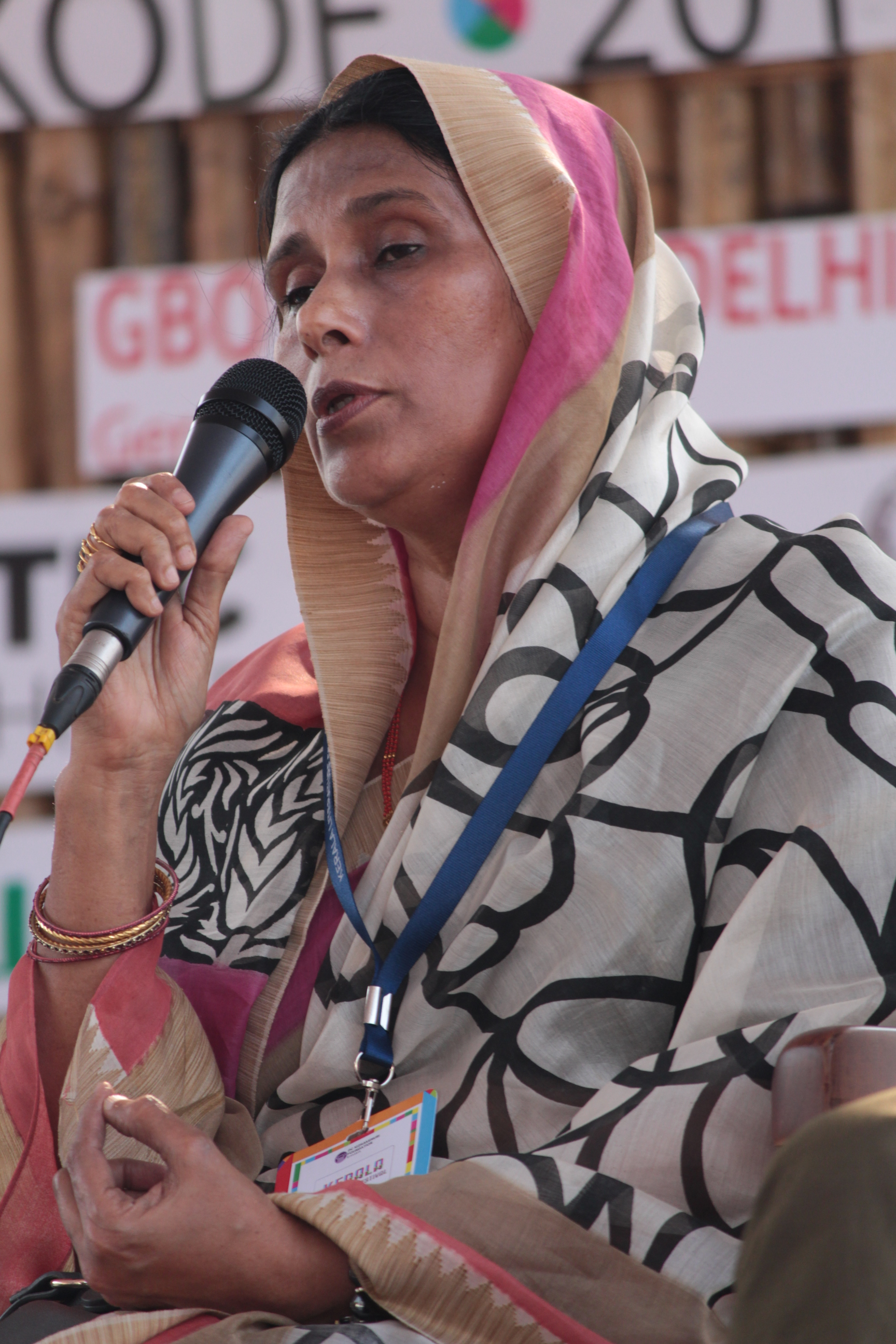 ബി.എം സുഹറ 2017 ഫെബ്രുവരി 5ന് കോഴിക്കോട് നടന്ന ലിറ്ററേച്ചര്‍ ഫെസ്റ്റിവലില്‍